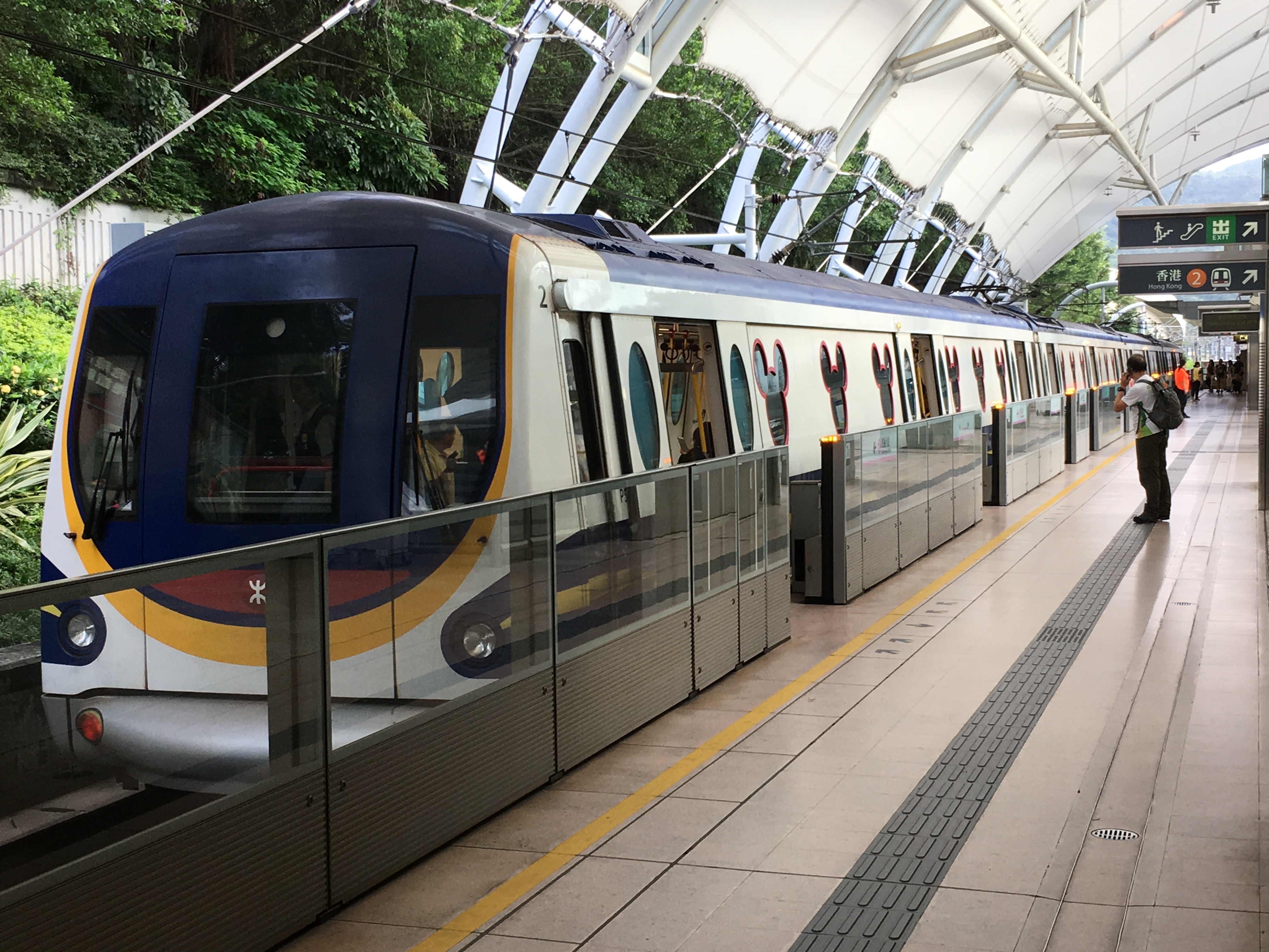 This photo is taken in Sunny Bay Station.